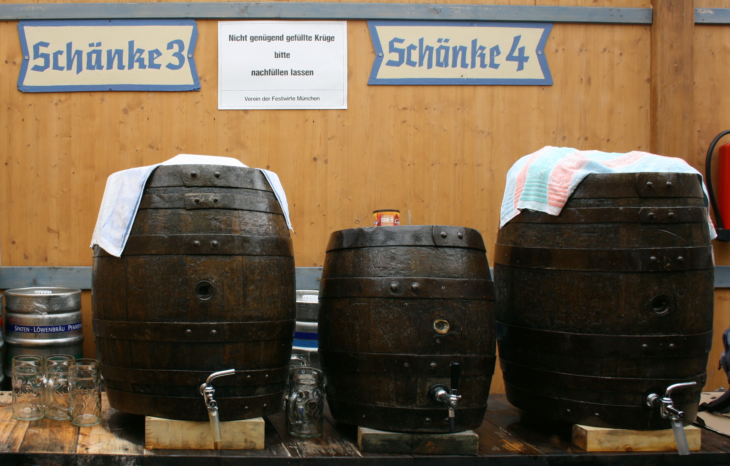 Schänke im Oktoberfestzelt Schottenhammel.